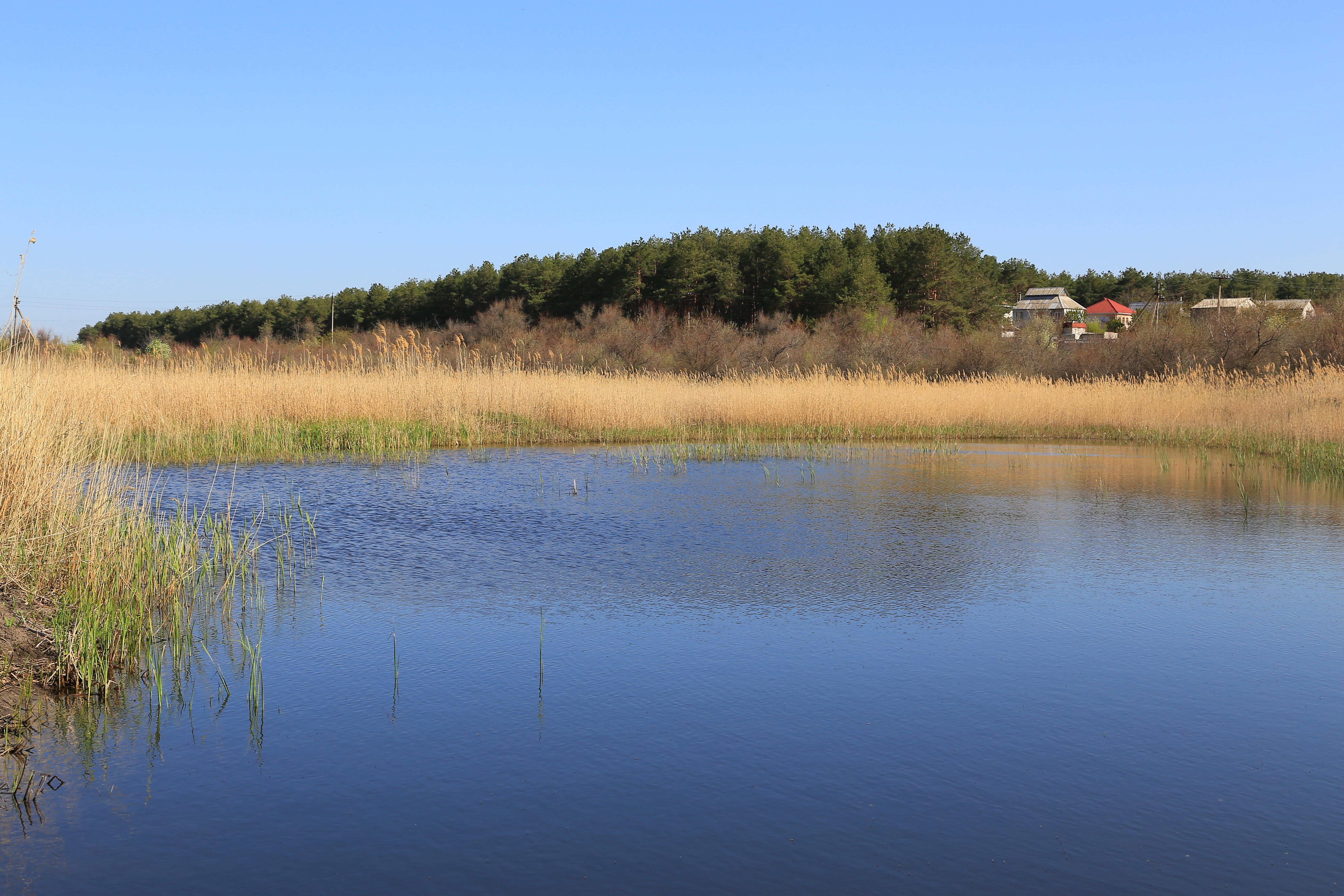 Штучний ставок для розведення мальків риби перетворився на окрасу природи